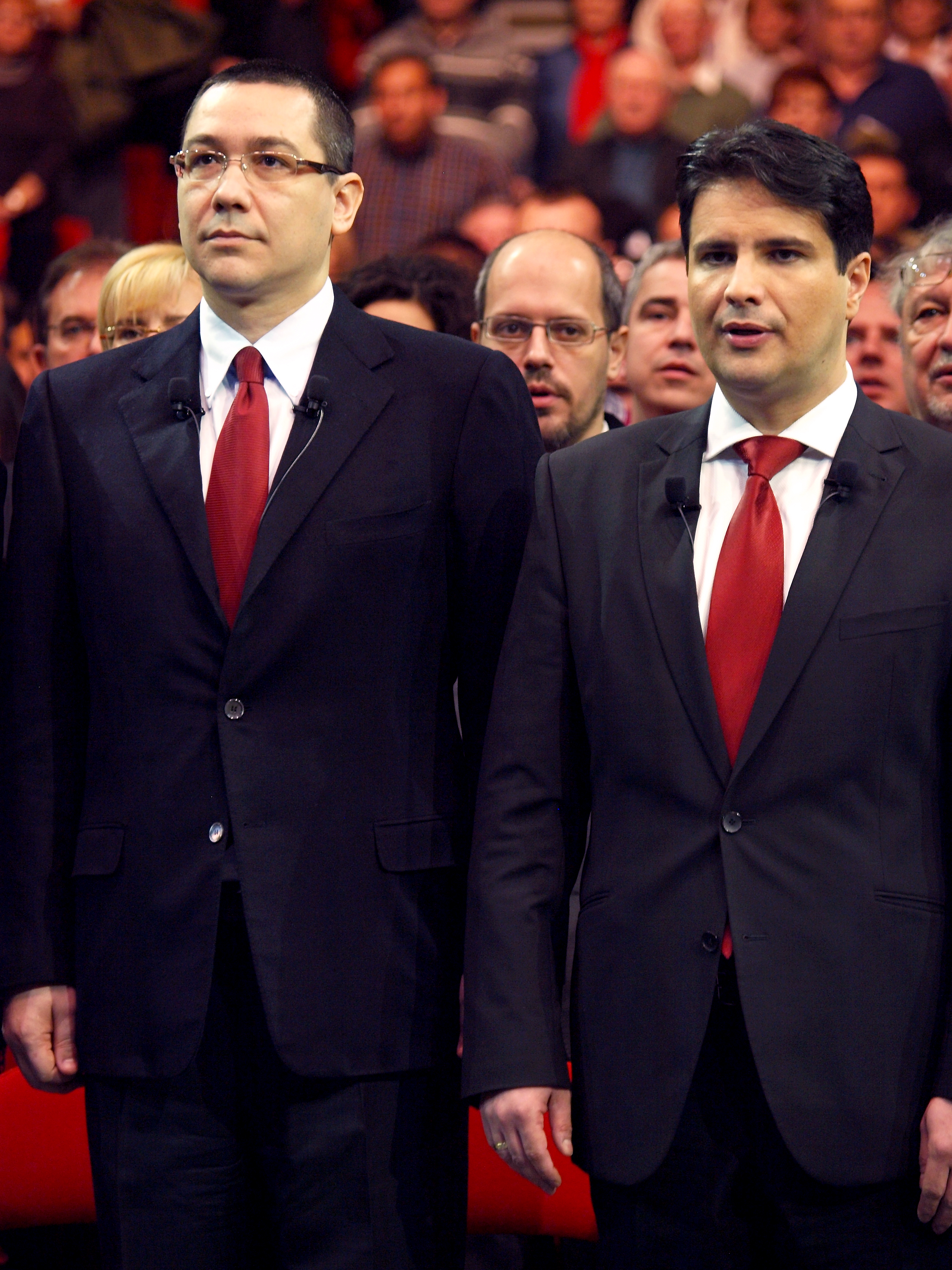 Mesterházy Attila Victor Ponta román kormányfővel az MSZP 2013. márciusi kongresszusán